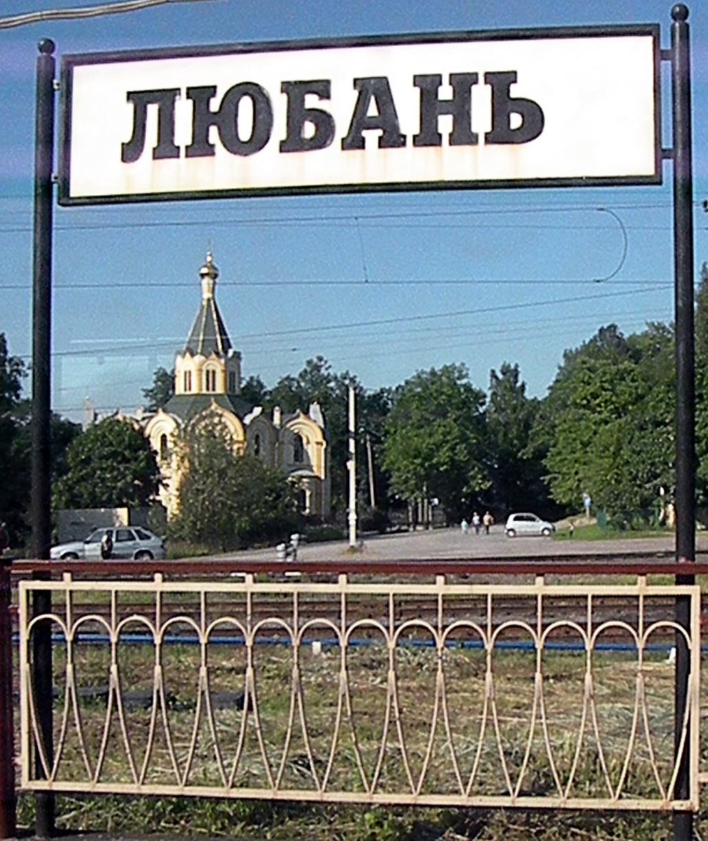 Храм в Любани